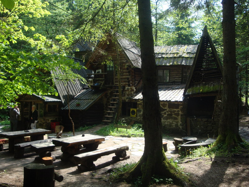 Зеленковац